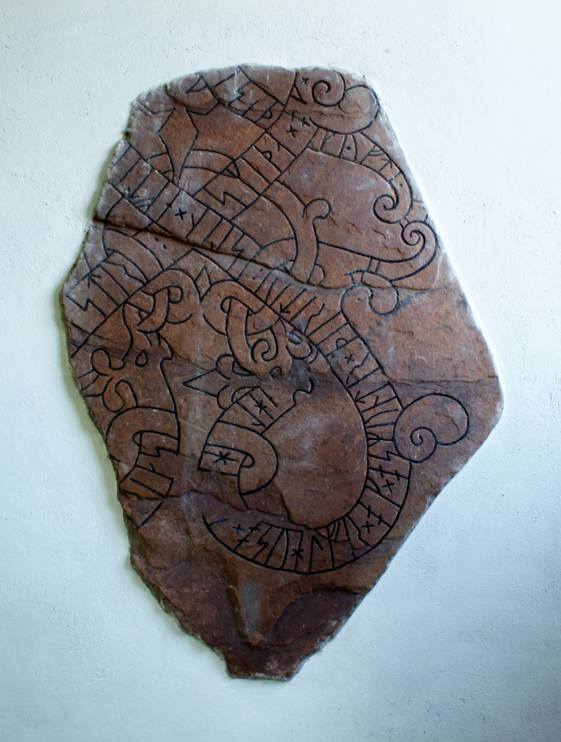 Fragment av runstenen Gs 14 i Ovansjö kyrka.